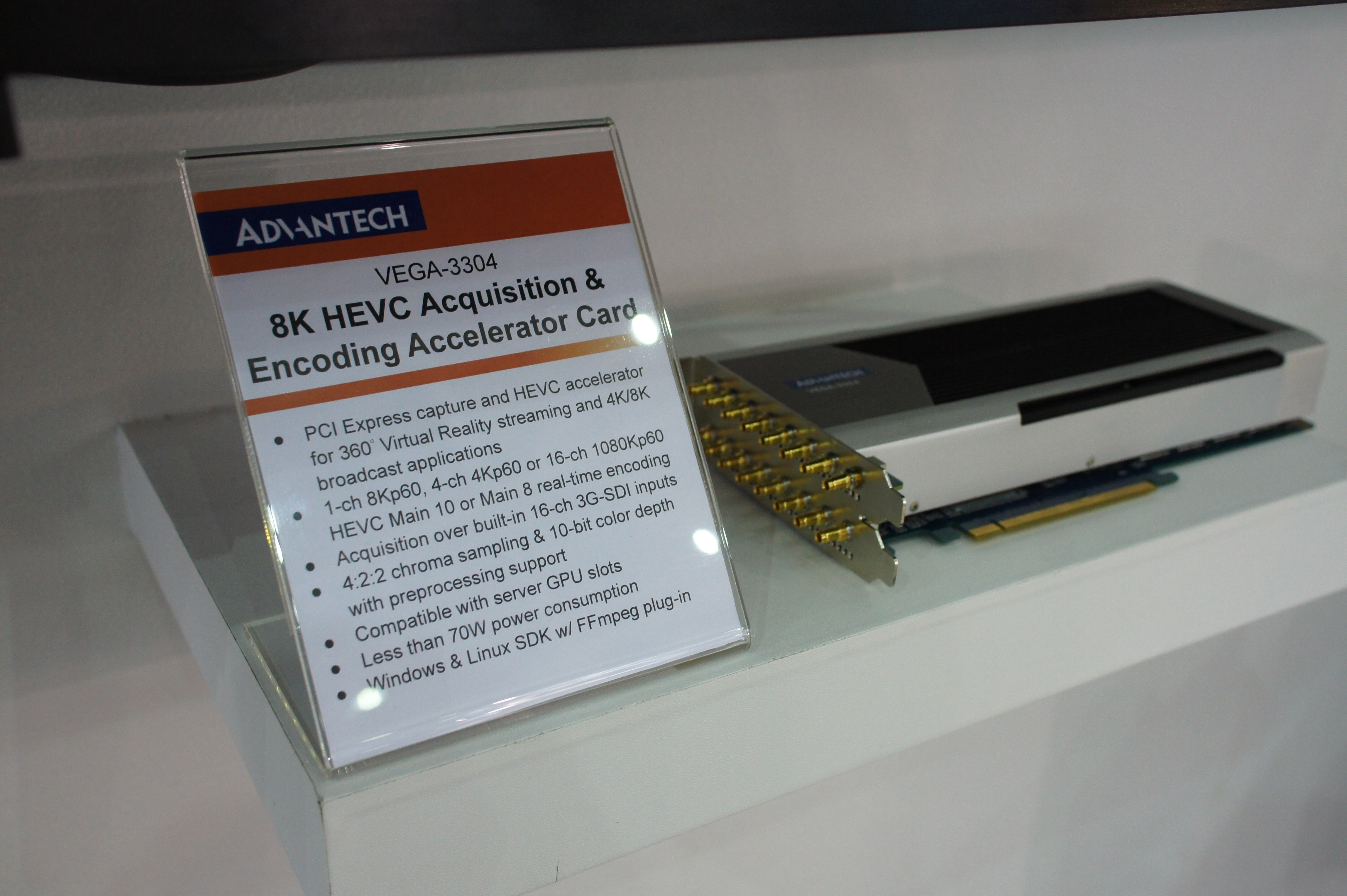 2017台北國際電腦展，研華8K HEVC影像編解碼卡VEGA-3304。